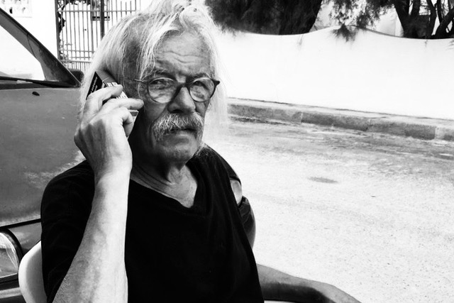 Foto vom Autor, Blogger, Zeichner Norbert Molitor